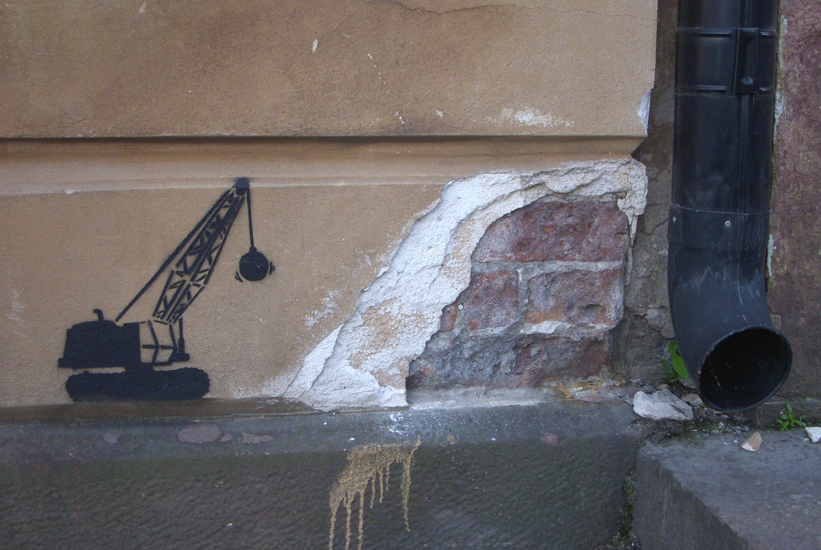 Gatukonst (schablon) på Hebbeska huset, Riddarholmen i Stockholm